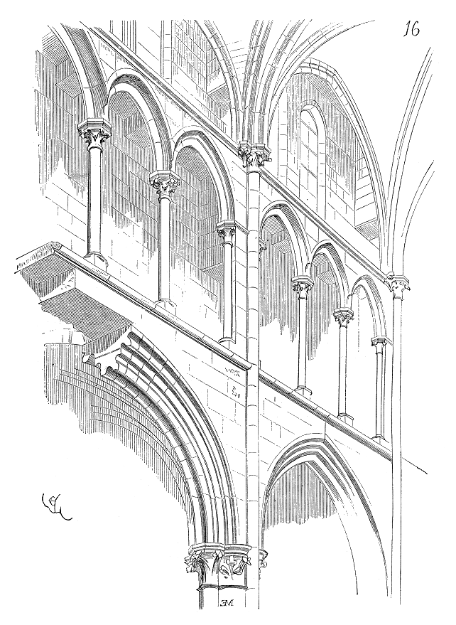 ... Voici (fig. 16) un exemple de cette structure, pris dans la jolie église de Saint-Martin de Clamecy. On voit combien, dans ces monuments bourguignons, le triforium prend d'importance. C'est un véritable portique élevé au-dessus des archivoltes du collatéral. Ce système ne peut conduire à relier la galerie avec le fenestrage supérieur, posé en retraite; aussi ne le voyons-nous adopté en Bourgogne, et dans une partie du Nivernais, que quand, dans ces provinces, on abandonne les traditions locales, vers la fin du XIVe siècle, pour recourir au style de l'architecture du domaine royal ...